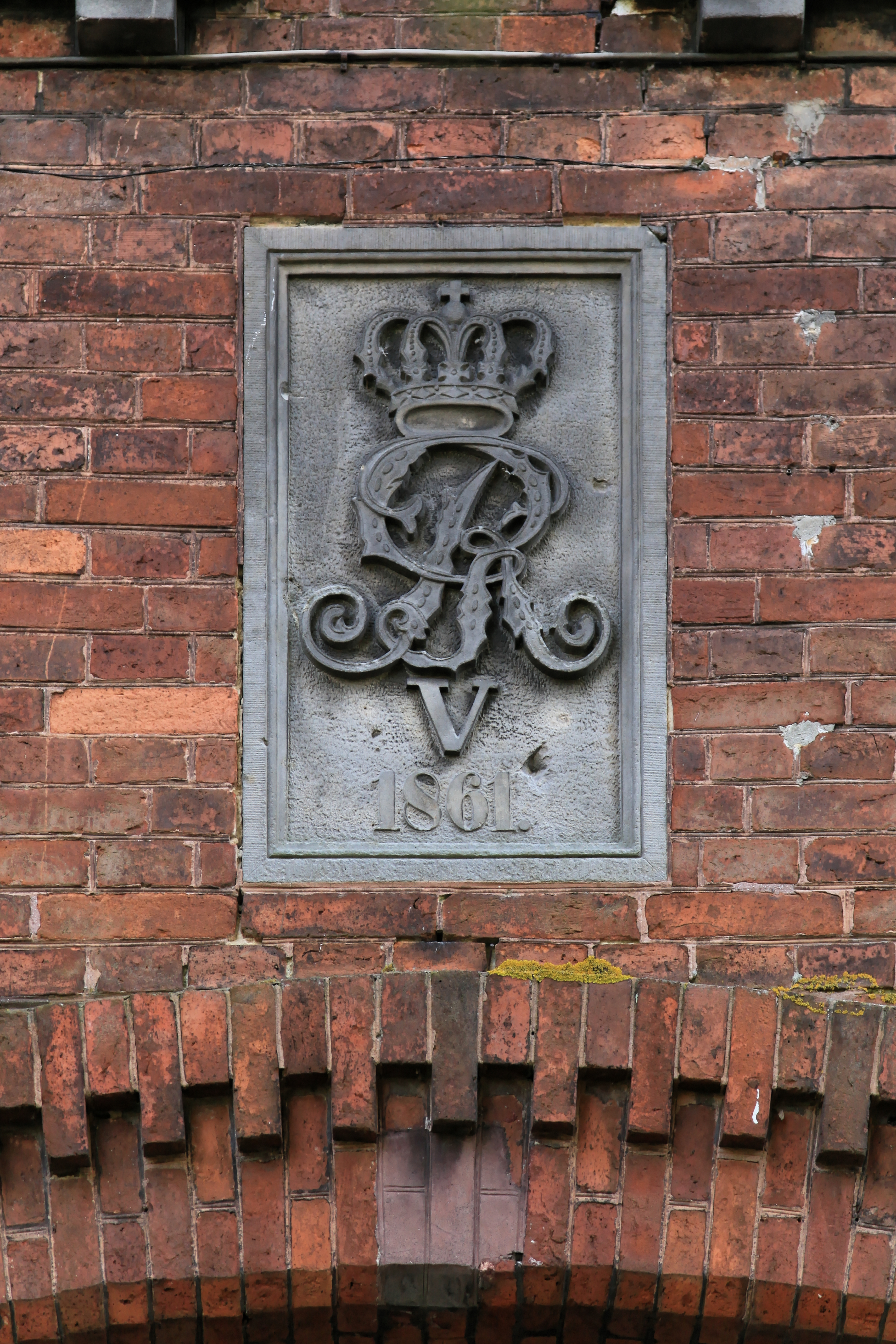 Amtshaus, Rathauspark, Norderstraße in Weener